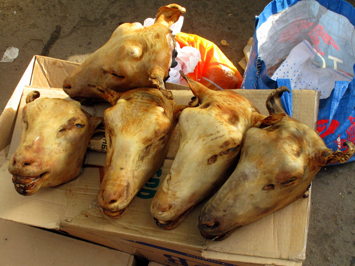 Green Bazar, Almaty